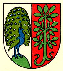 Wappen von Faoug Kanton Waadt Schweiz